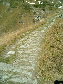 Aufstieg zum Septimerpass von der Südseite (Casaccia), im Bild die antike Passstrasse